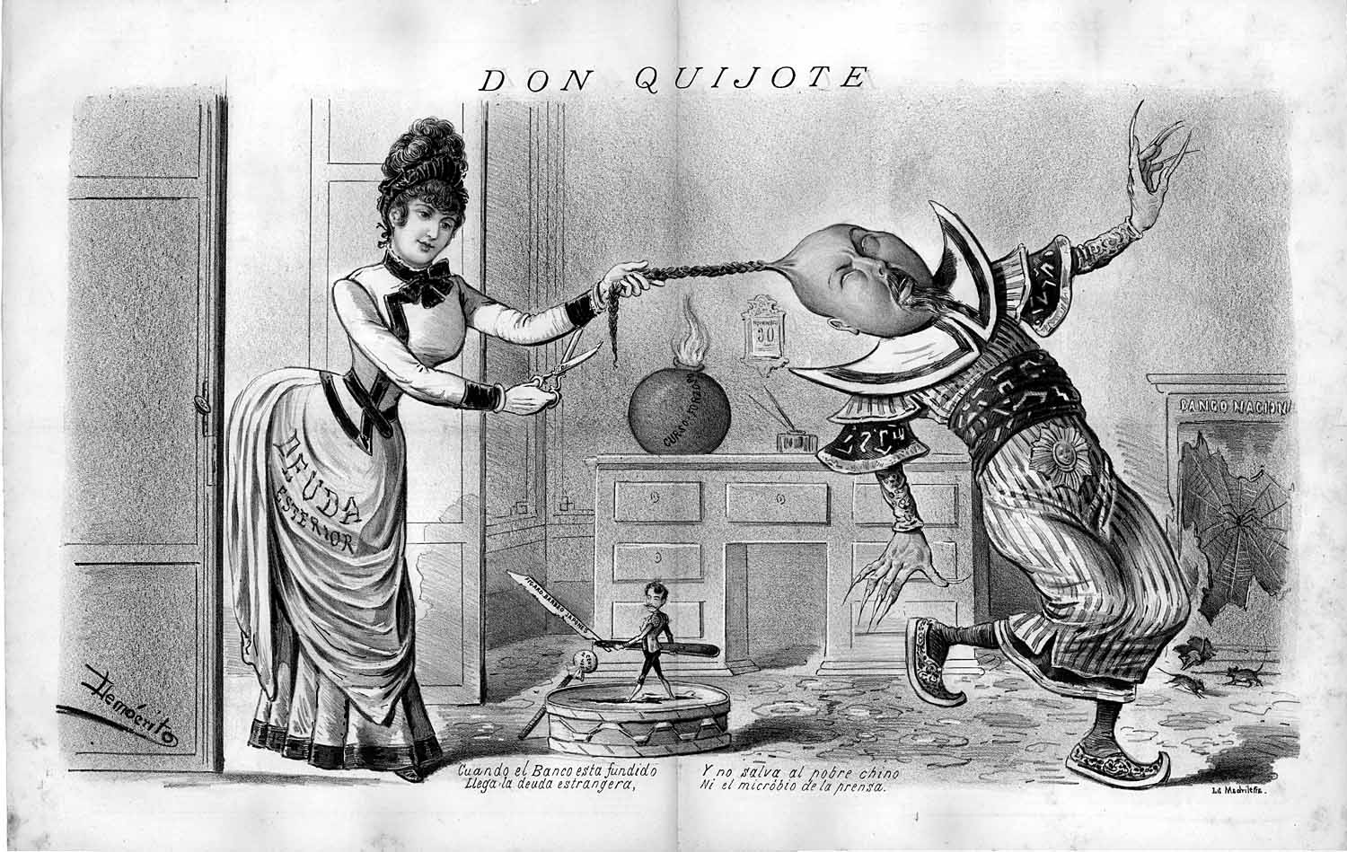 Cuando el Banco está fundido llega la deuda estrangera. Y no salva al pobre chino ni el microbio de la prensa, de Eduardo Sojo «Demócrito, publicada en la revista satírica argentina Don Quijote.